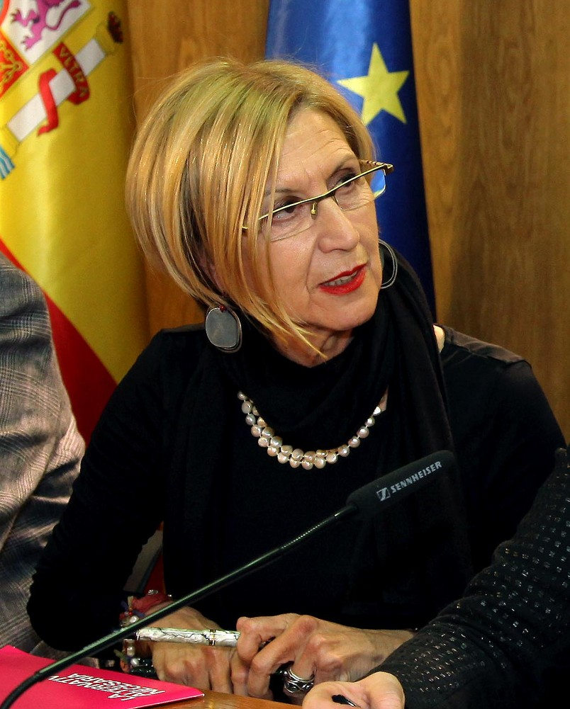 Rosa Díez y Esperanza Aguirre en un homenaje a Oswaldo Payá y Harold Cepero